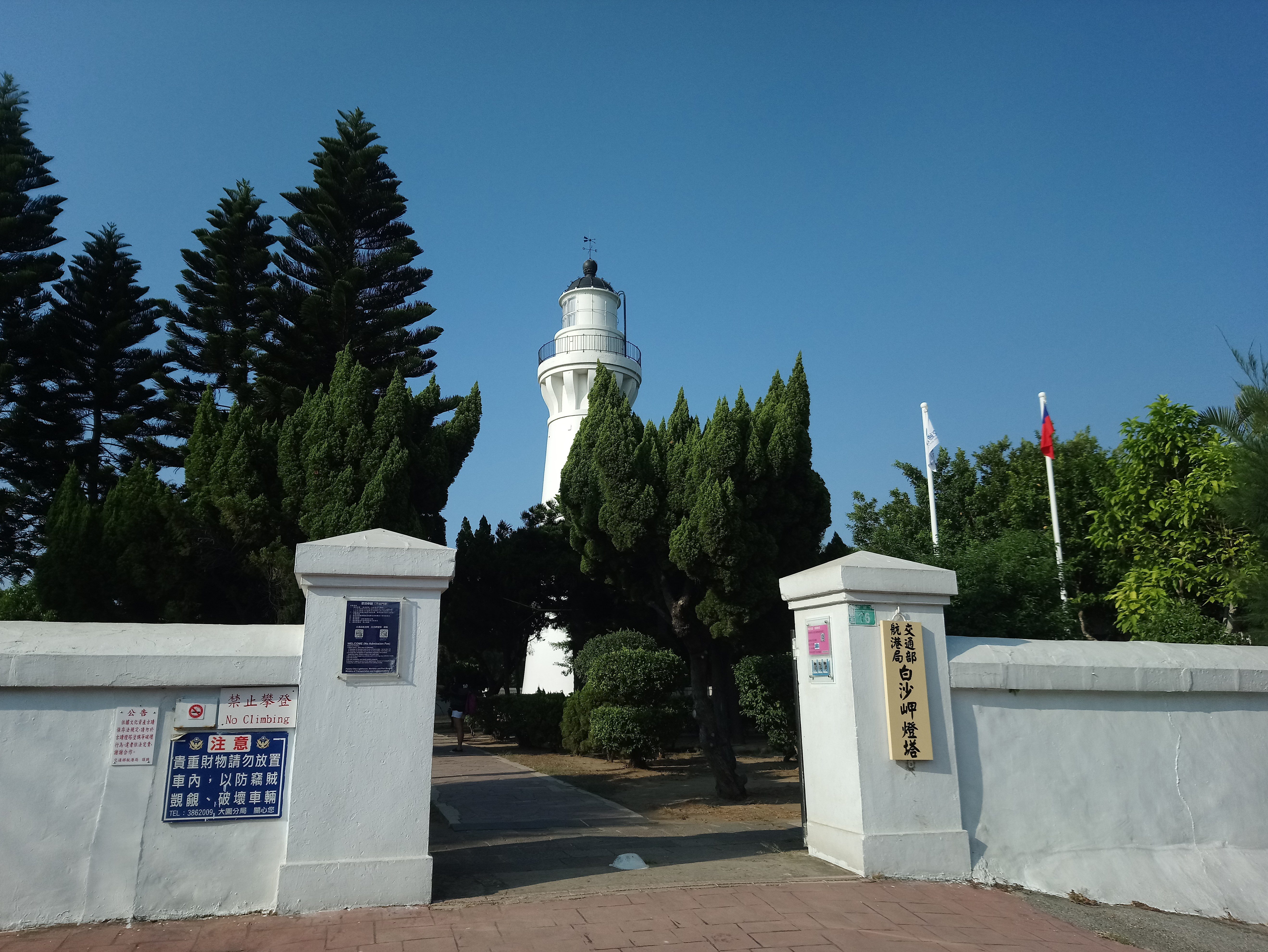 白沙岬燈塔入口,桃園市觀音區觀音地區觀音里